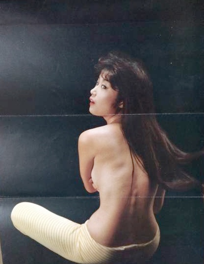 扇町京子、1962年11月。